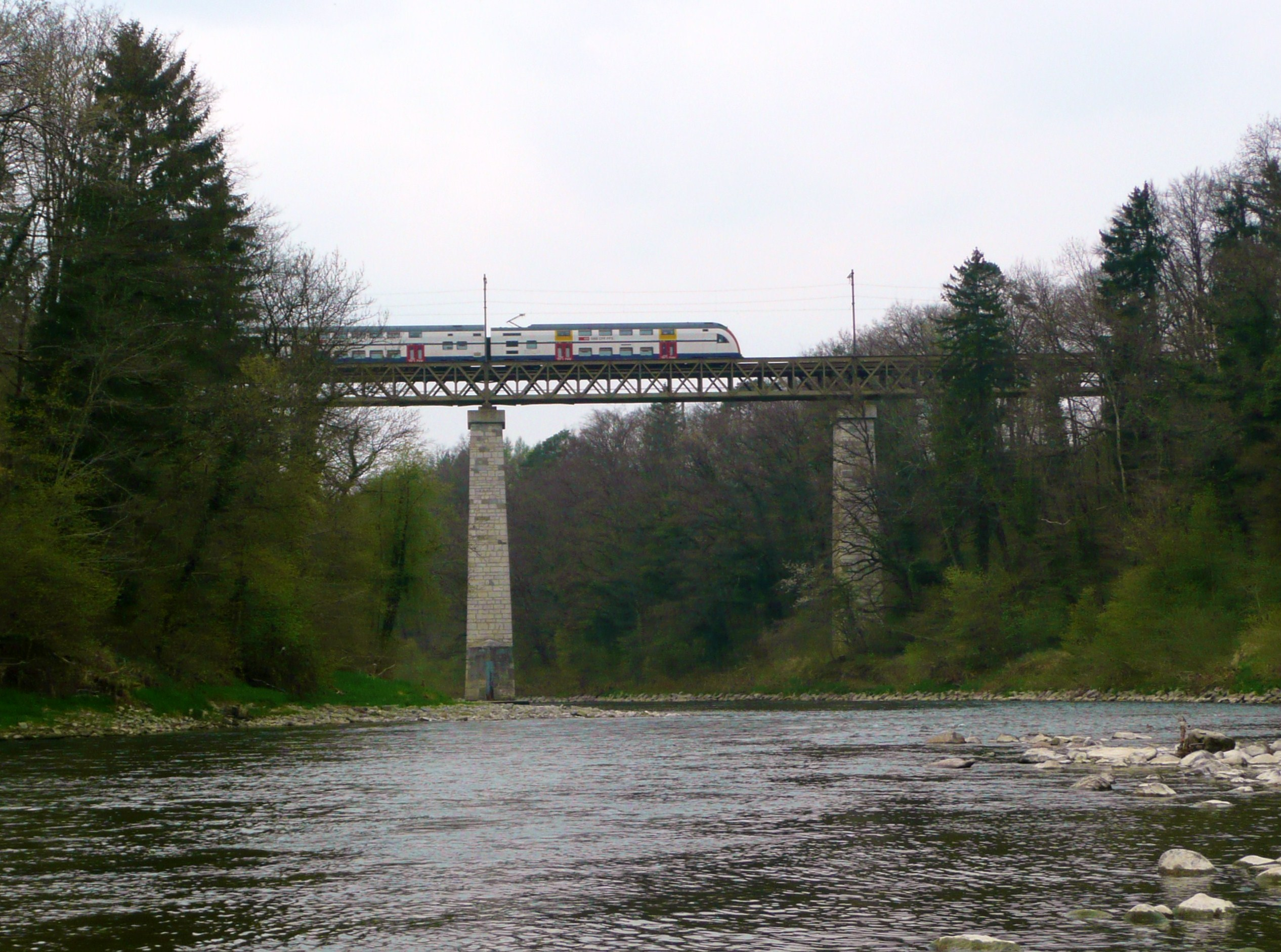 Eisenbahnbrücke bei Andelfingen. Die Brücke wurde für die Rheinfallbahn Schaffhausen - Winterthur erbaut.